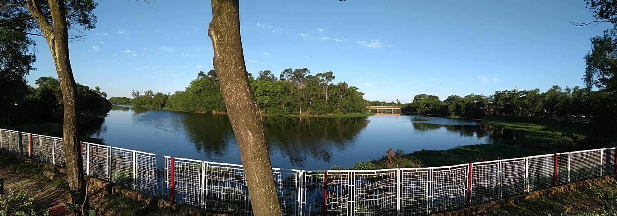 Panorámica del río Negro desde el sector de pileta del Club de Regatas Resistencia. Se aprecia una típica curva del río y a la derecha el puente cerca del cual se produjo el primer desembarco de inmigrantes a la ciudad.